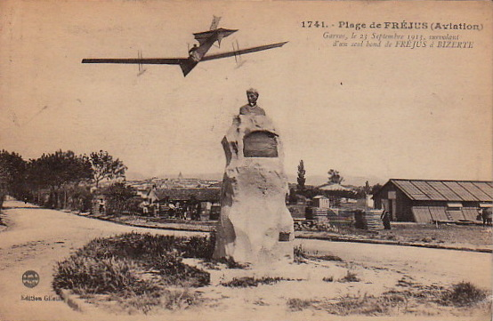 Plage de Fréjus Garros survolant la plage